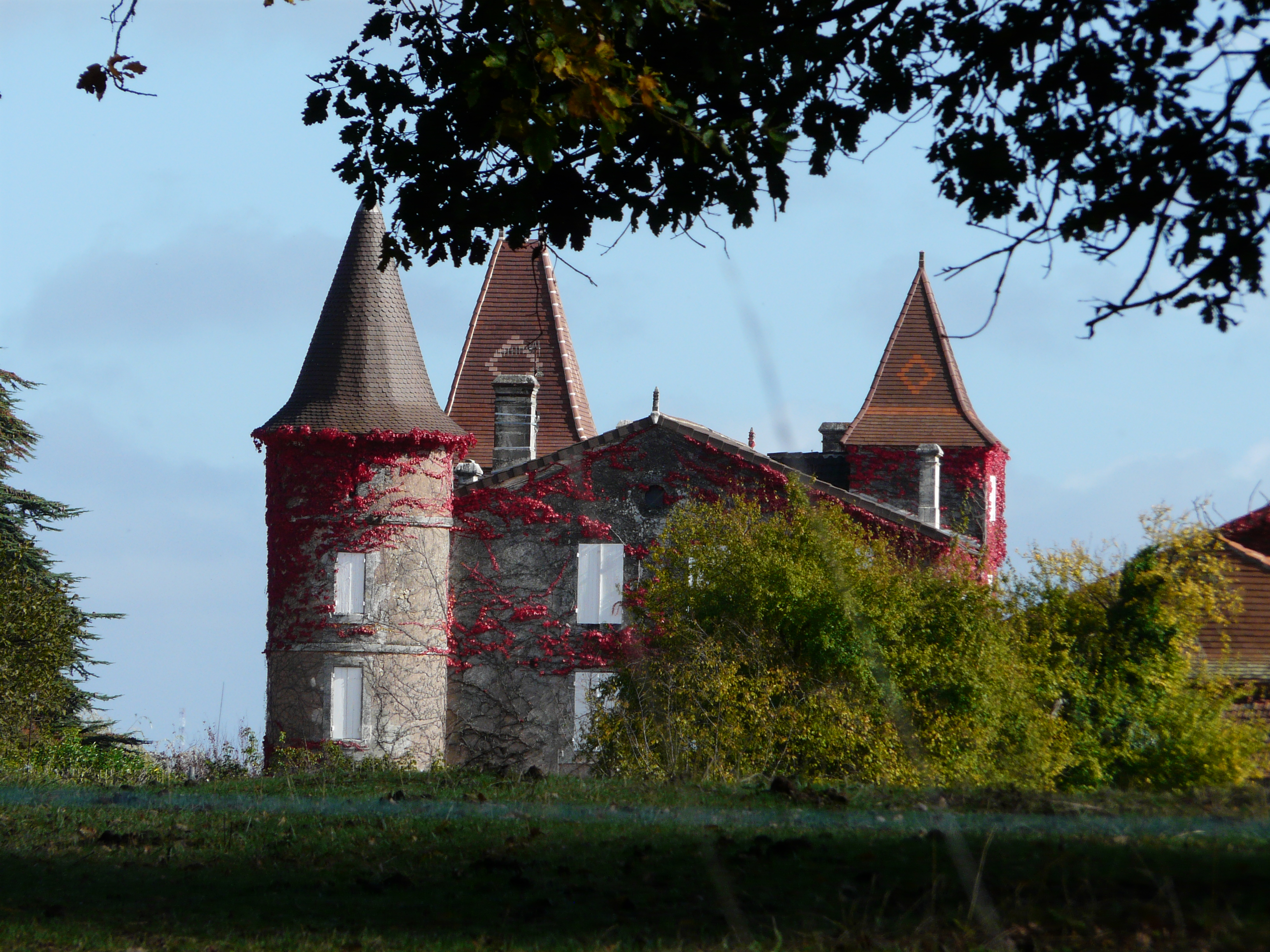 Le château Trompette vu de l'ouest, Vanxains, Dordogne, France Object location45° 13′ 25.8″ N, 0° 17′ 44.2″ E